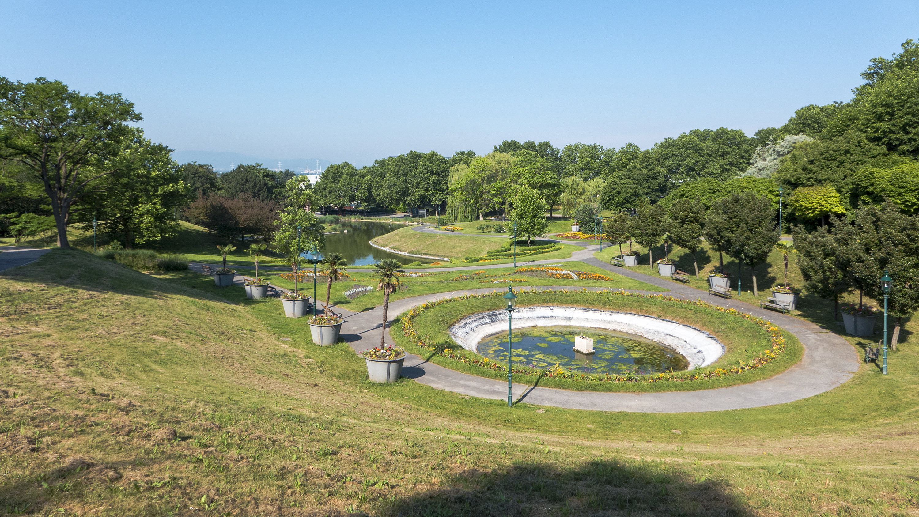 Kurpark Oberlaa in Wien 10, Kurgarten